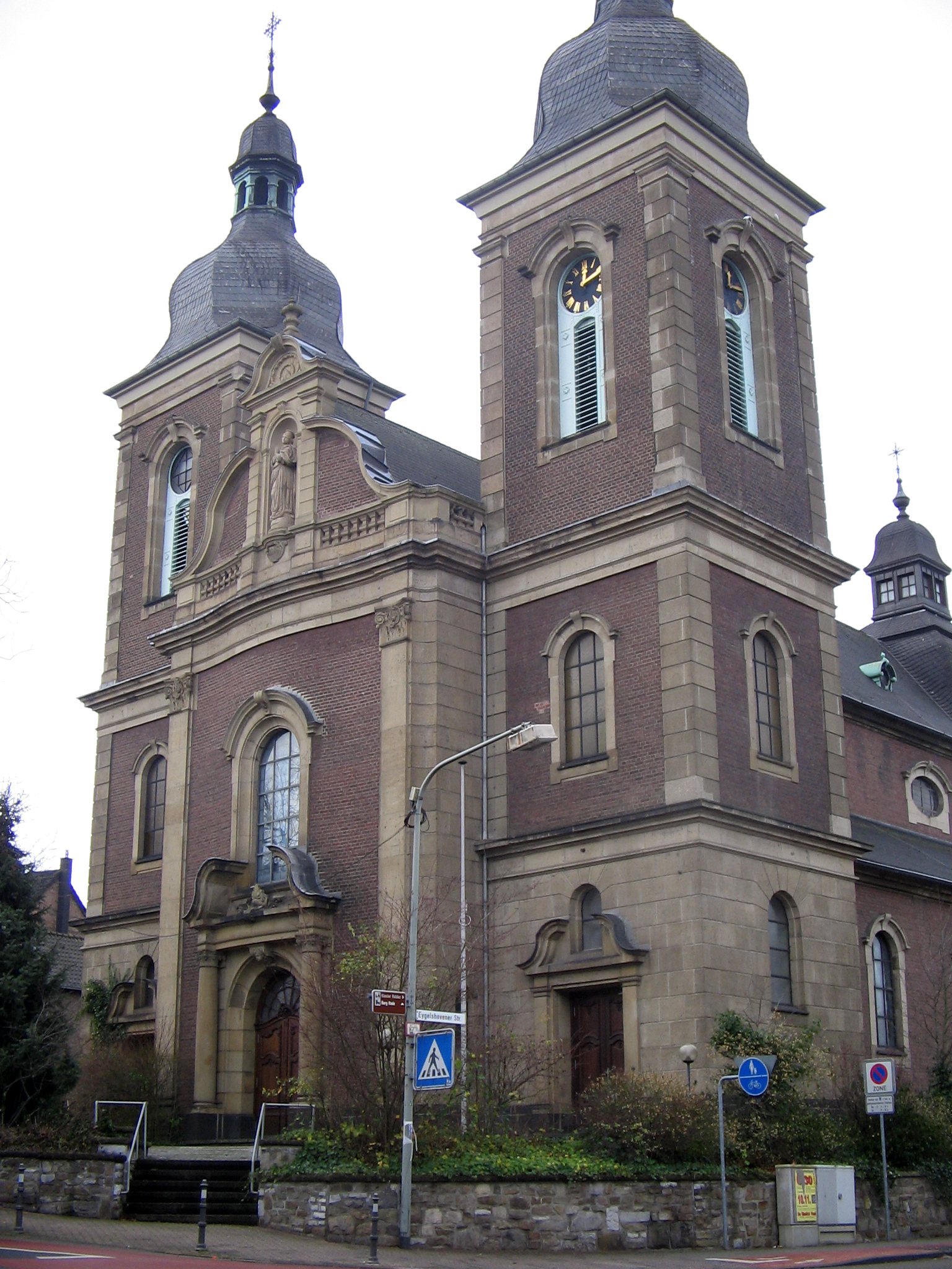 Kirche Herz. Kleikstraße in Herzogenrath